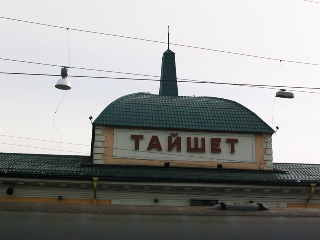 Taishet, Irkutsk region, Russia